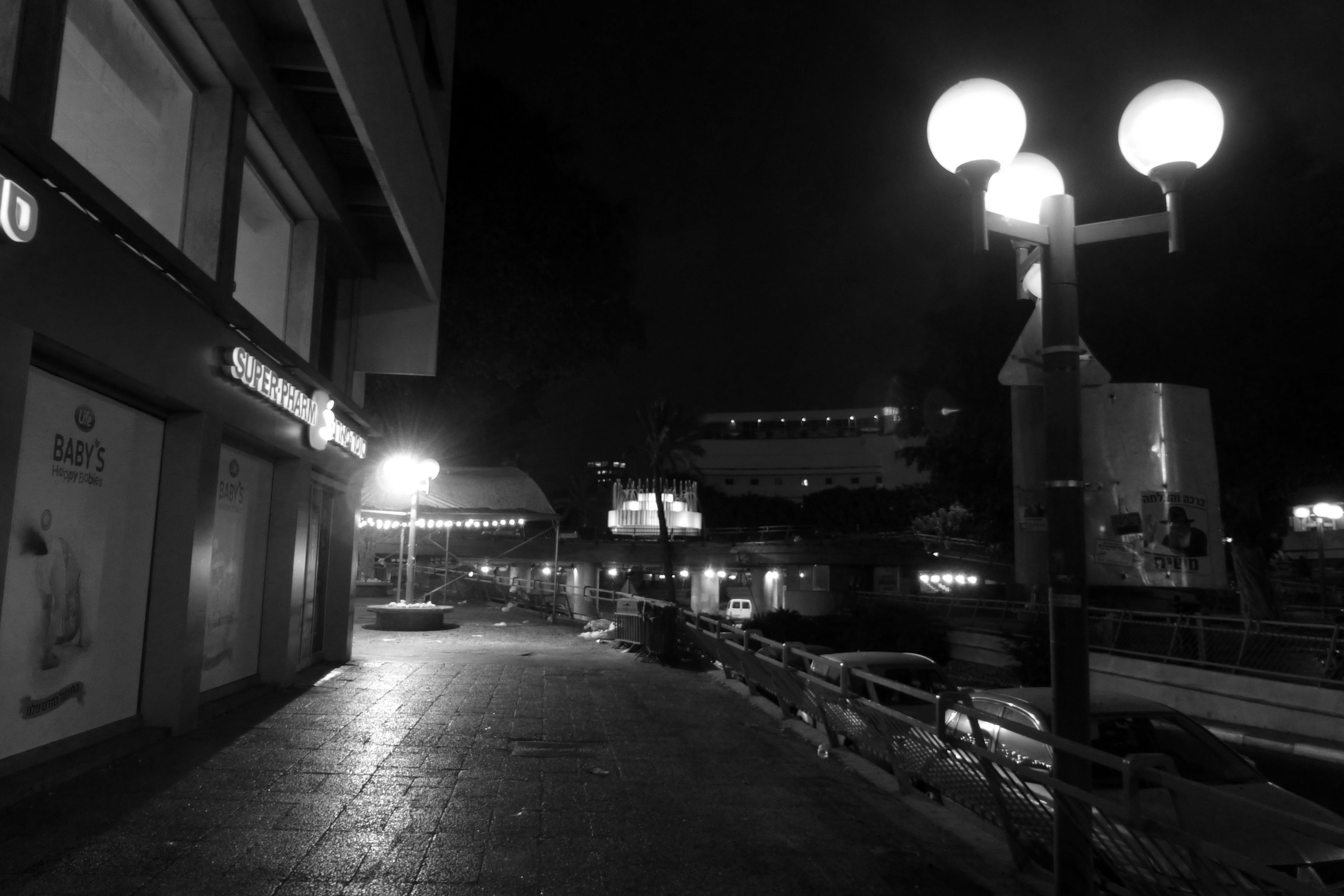 כיכר צינה דיזנגוף קרויה על שם צינה דיזנגוף, רעייתו של ראש העיר הראשון, מאיר דיזנגוף. הכיכר נחשבה במשך שנים רבות כאחד מסמליה של תל אביב. הכיכר הייתה חלק מתוכנית גדס, תוכנית מתאר לעיר תל אביב שהכין פטריק גדס, מתכנן ערים סקוטי. עיצוב הכיכר נעשה על ידי האדריכלית ג'ניה אוורבוך, שזכתה בתחרות העיצוב של הכיכר בשנת 1934. התכנון היה על פי קריטריונים של הסגנון הבינלאומי, שהיה הסגנון האדריכלי המרכזי בתל אביב בתקופה זו.